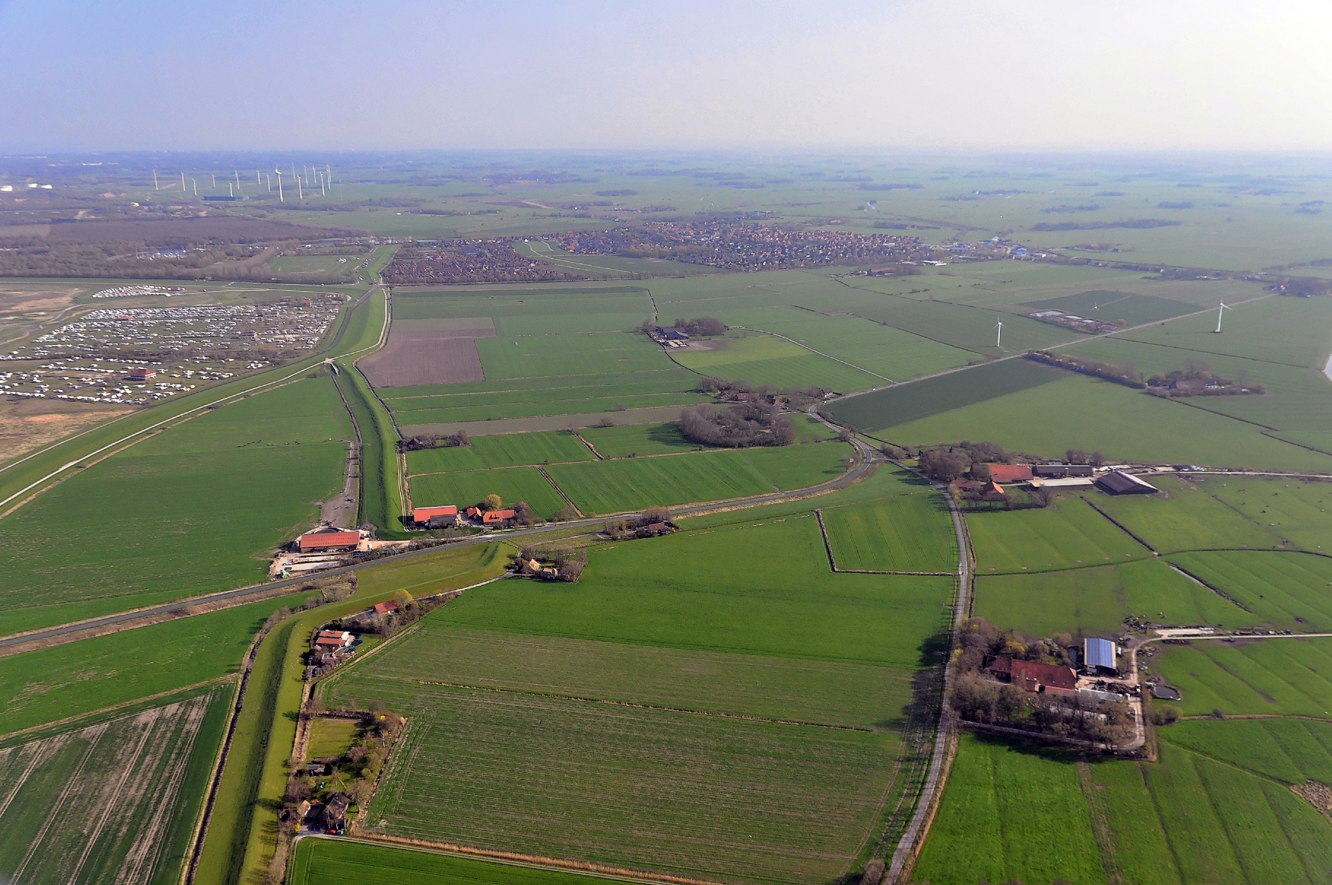 Luftbilder von der Nordseeküste 2013-05. Blick von "Neu St. Joostergroden" in Richtung Süden. Im Vordergrund St. Joostergroden, in der Bildmitte links von der S-Kurve der ehemalige Standort des Fort Crildumersiel. Im Hintergrund Hooksiel.